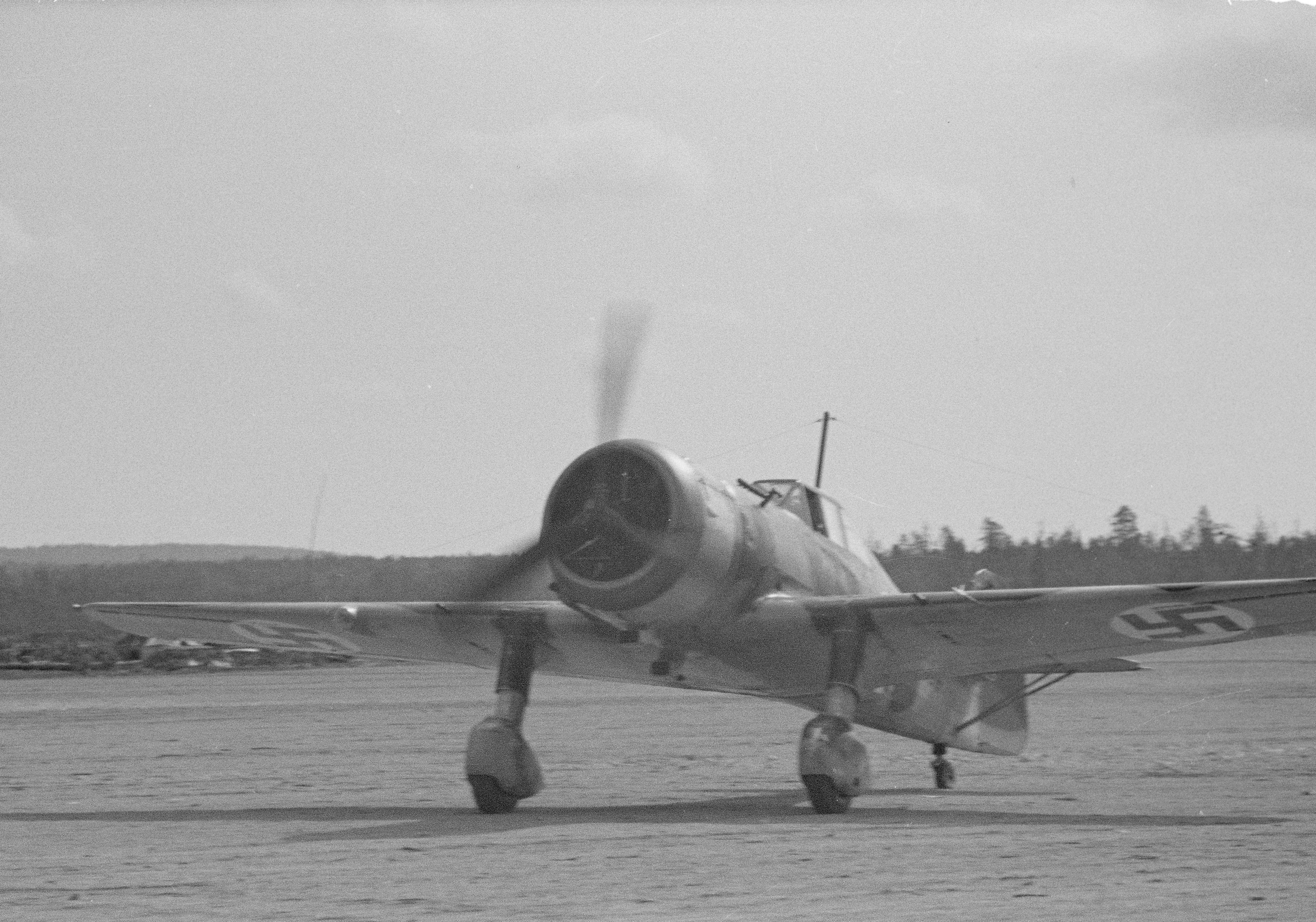 Luutnantti T.Vuorinen on juuri saapunut 100:lta sotalennoltaan. (Kuvassa on Fokker D.XXI -hävittäjä) Kuvauspaikka